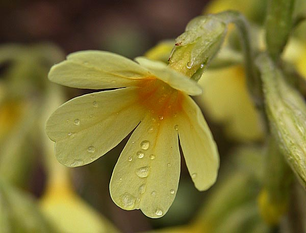 Wald-Schlüsselblume bzw. Hohe Schlüsselblume (primula elatior), aufgenommen im Schwalbachswald in Buseck